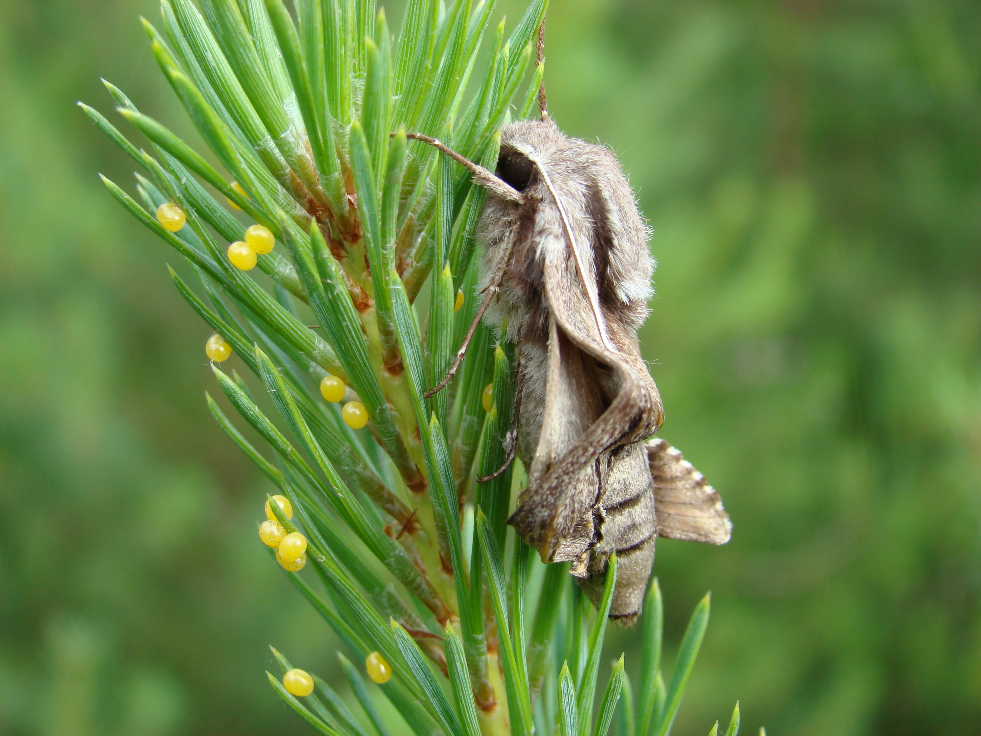 Kiefernschwärmer weiblich bei der Eiablage